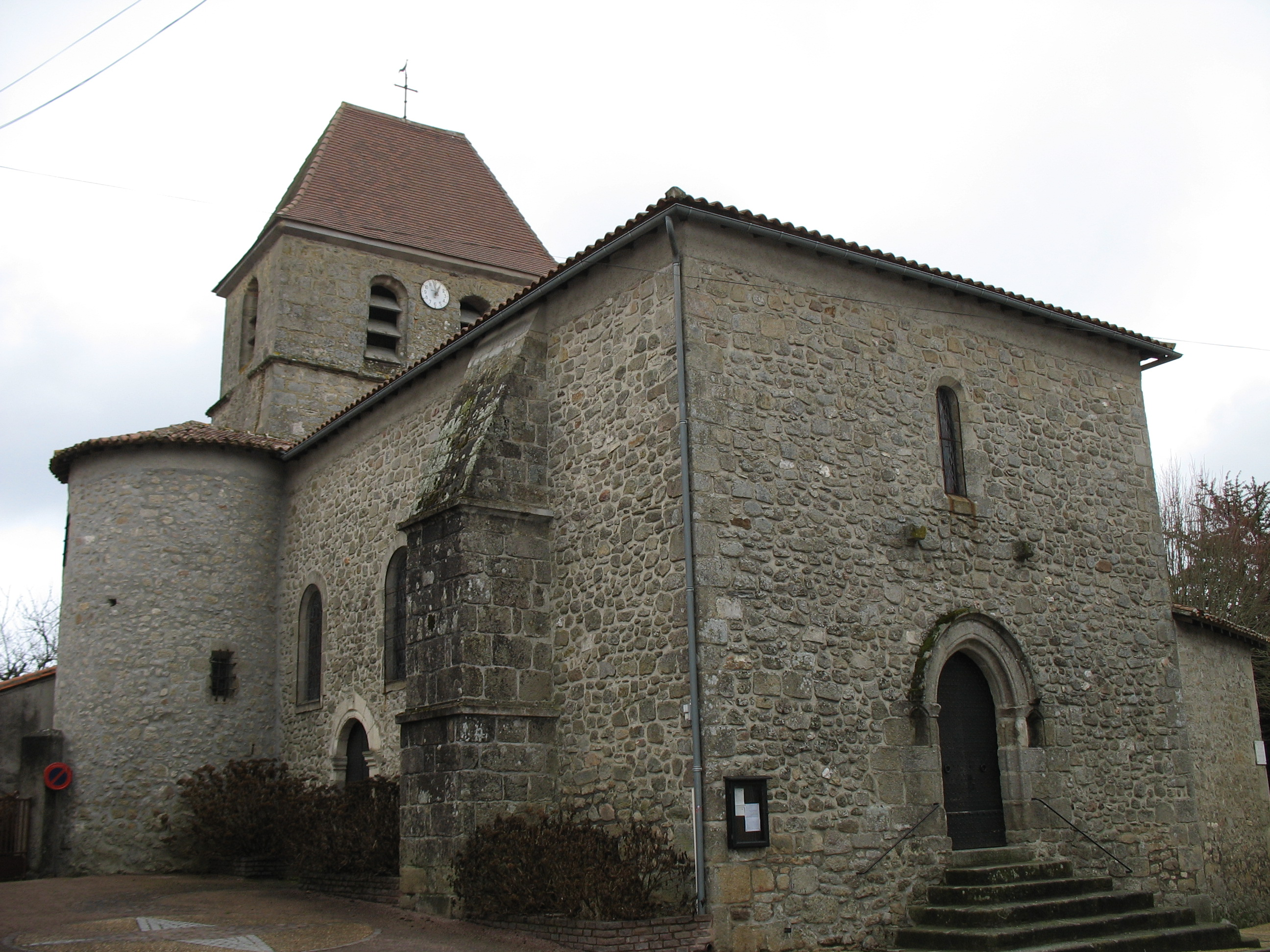 L'église de Saint-Saud-Lacoussière.